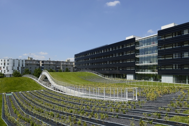 Pôle de recherche Descartes +.